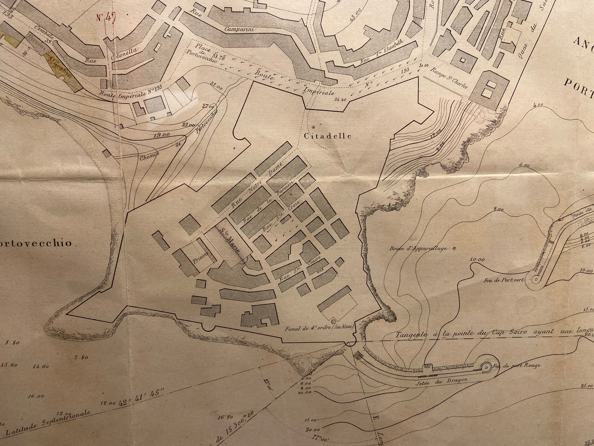 Corsu: Detagliu di un pianu di u portu di Bastia di Etienne-François Ferdinand Raibaud, 1866. Museu di Bastia